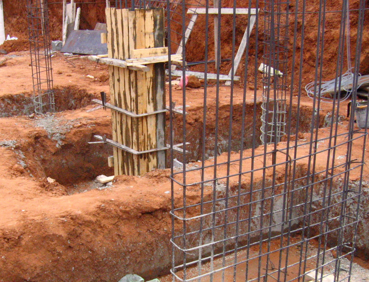 Concrete columns